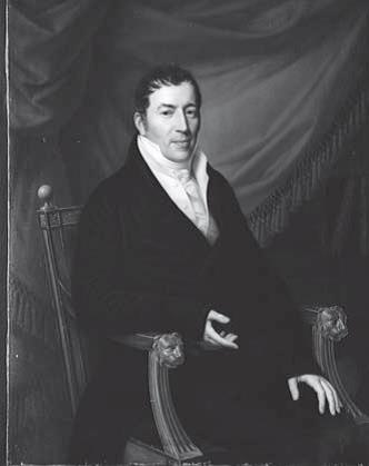 Porträt Johann Friedrich Hach (1769-1851) Bezeichnet u. r.: R. Suhrlandt/1820; Inv. Nr. 1975/125 MKK Lübeck